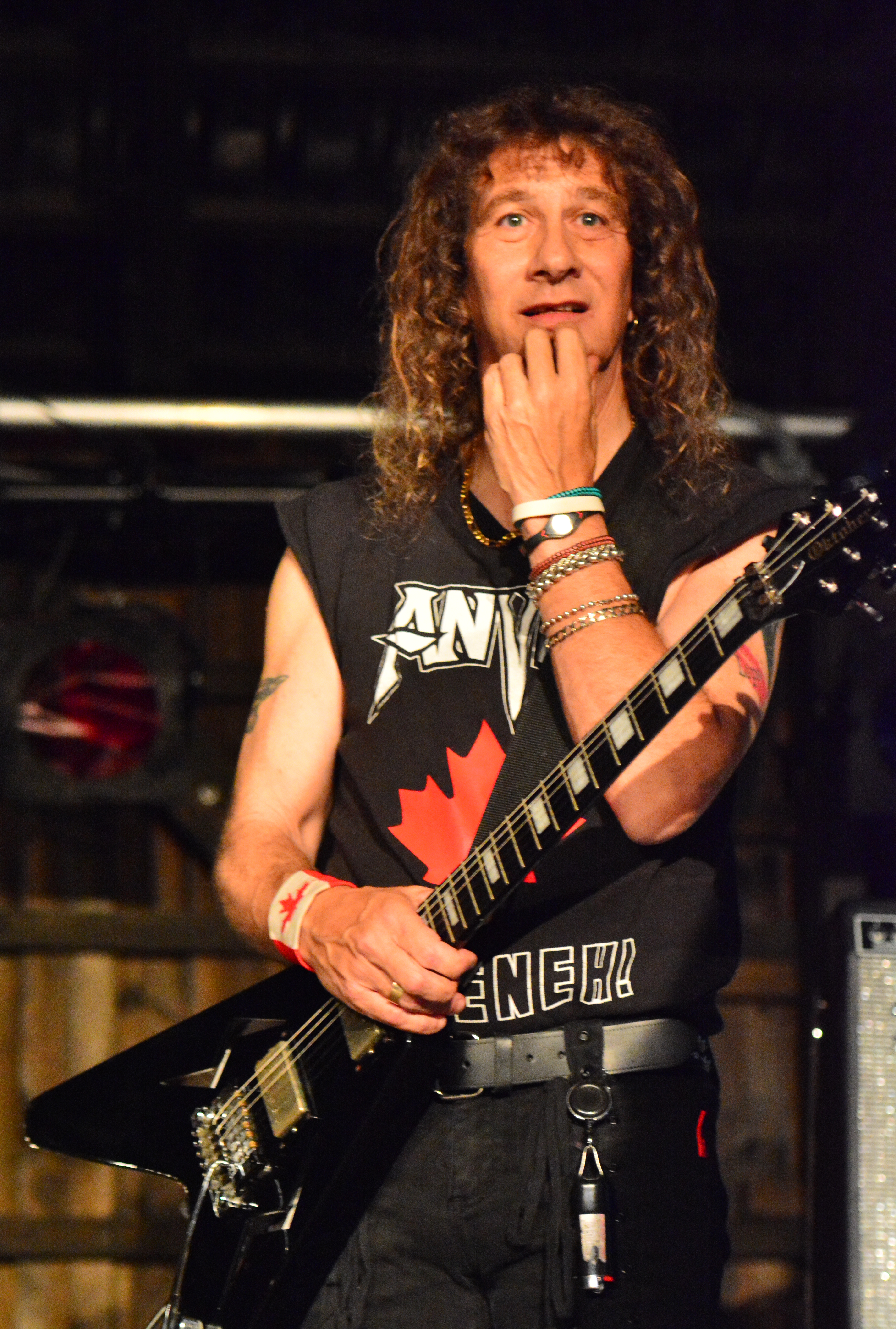 Steve „Lips“ Kudlow von Anvil beim Headbangers Open Air 2014